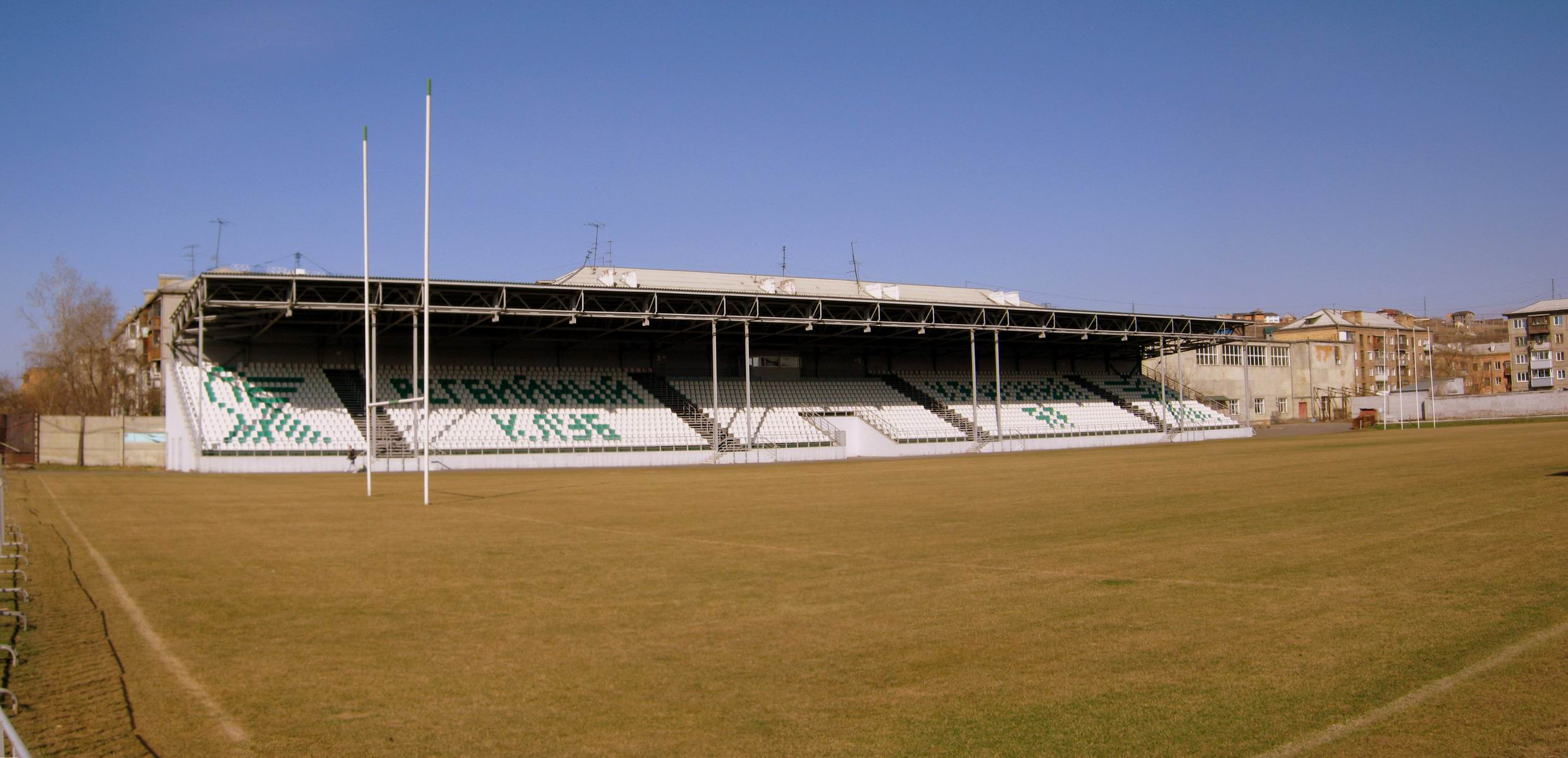 Стадион-Торпедо